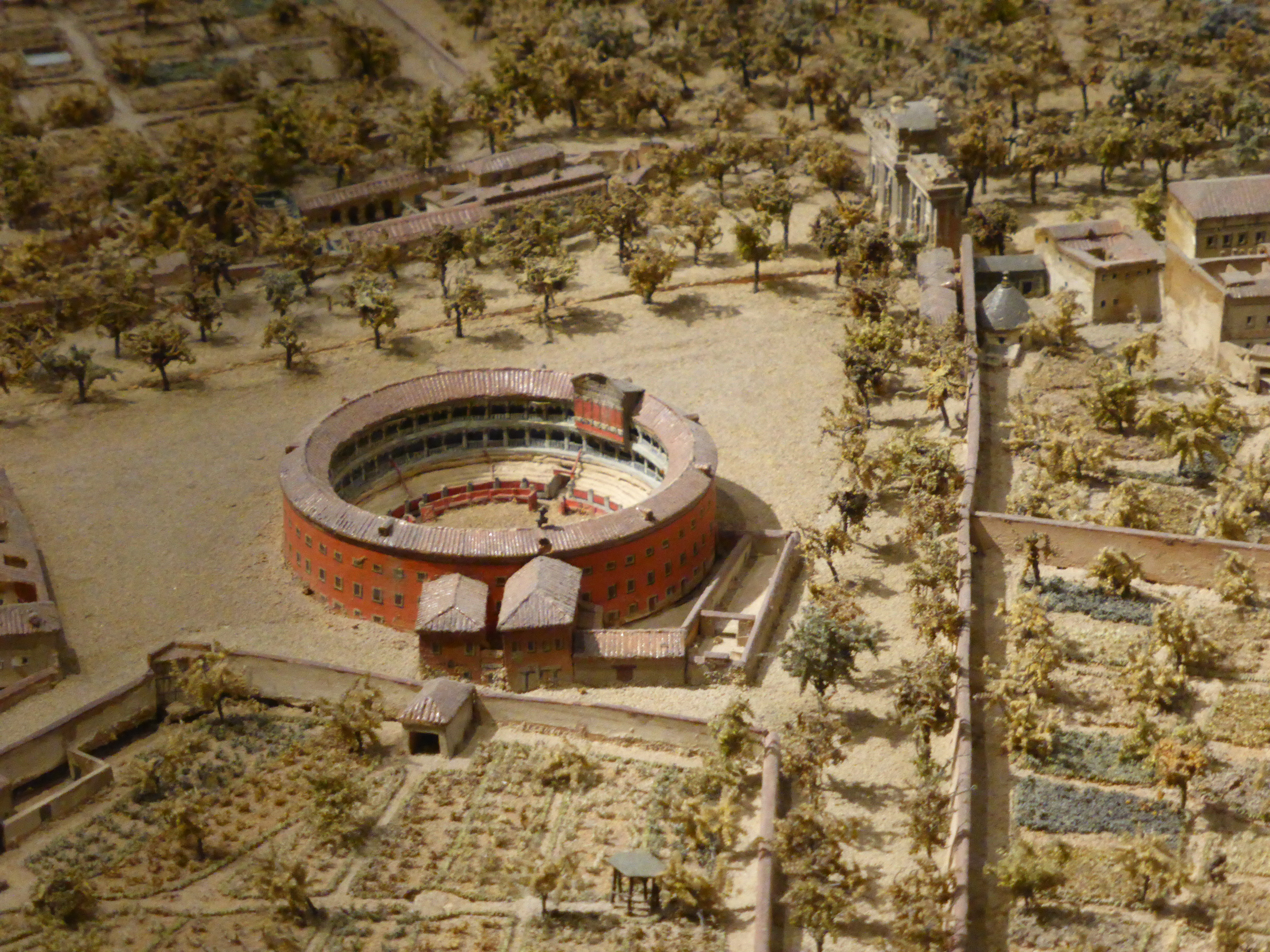 En la maqueta o "Modelo de Madrid", de los años 1828-1830, encontramos la plaza de toros junto al Parque del Retiro y la Puerta de Alcalá. Esta primitiva plaza de toros dejó de funcionar en 1874.